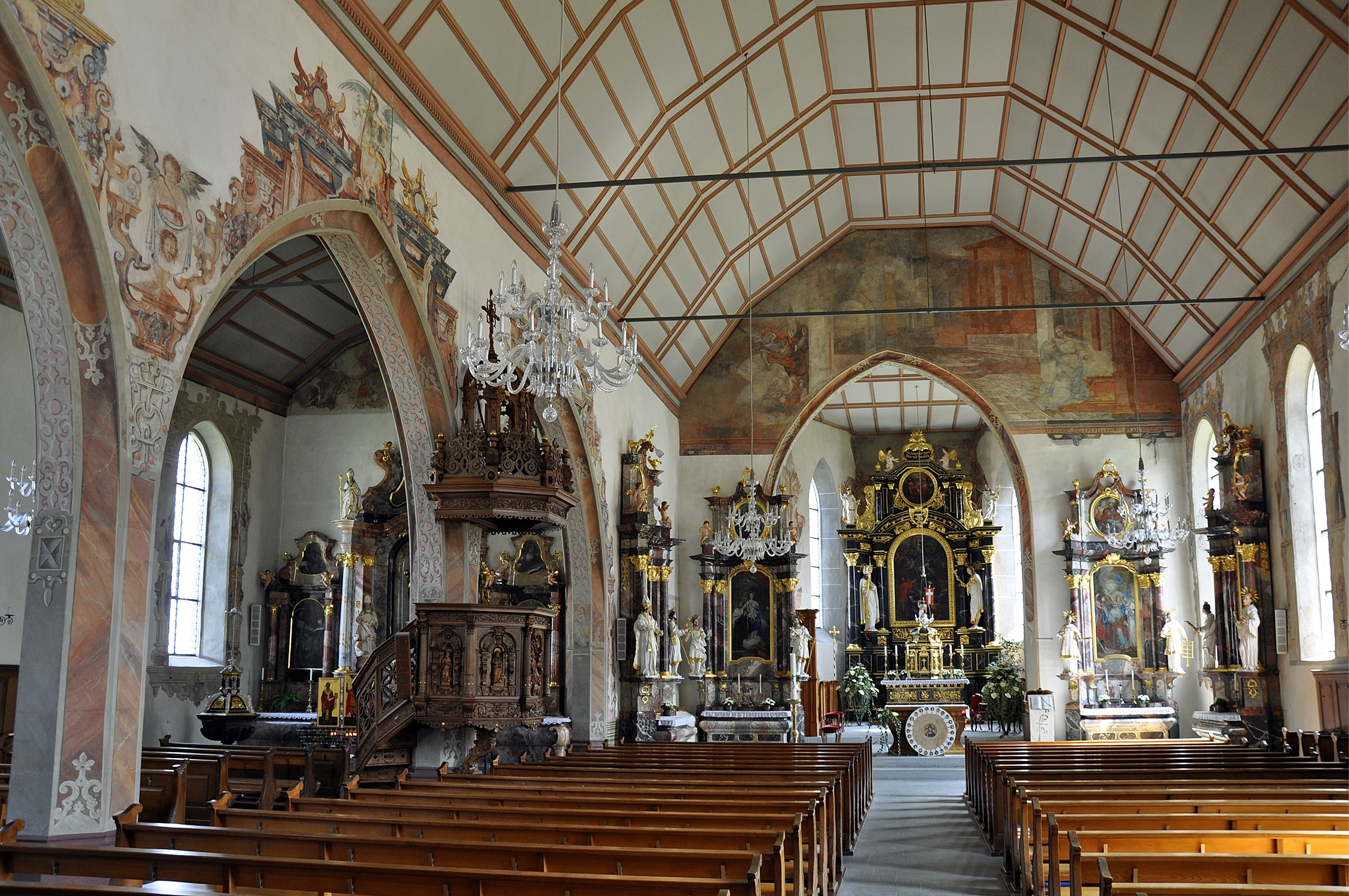 Inneres der Pfarrkirche Bremgarten